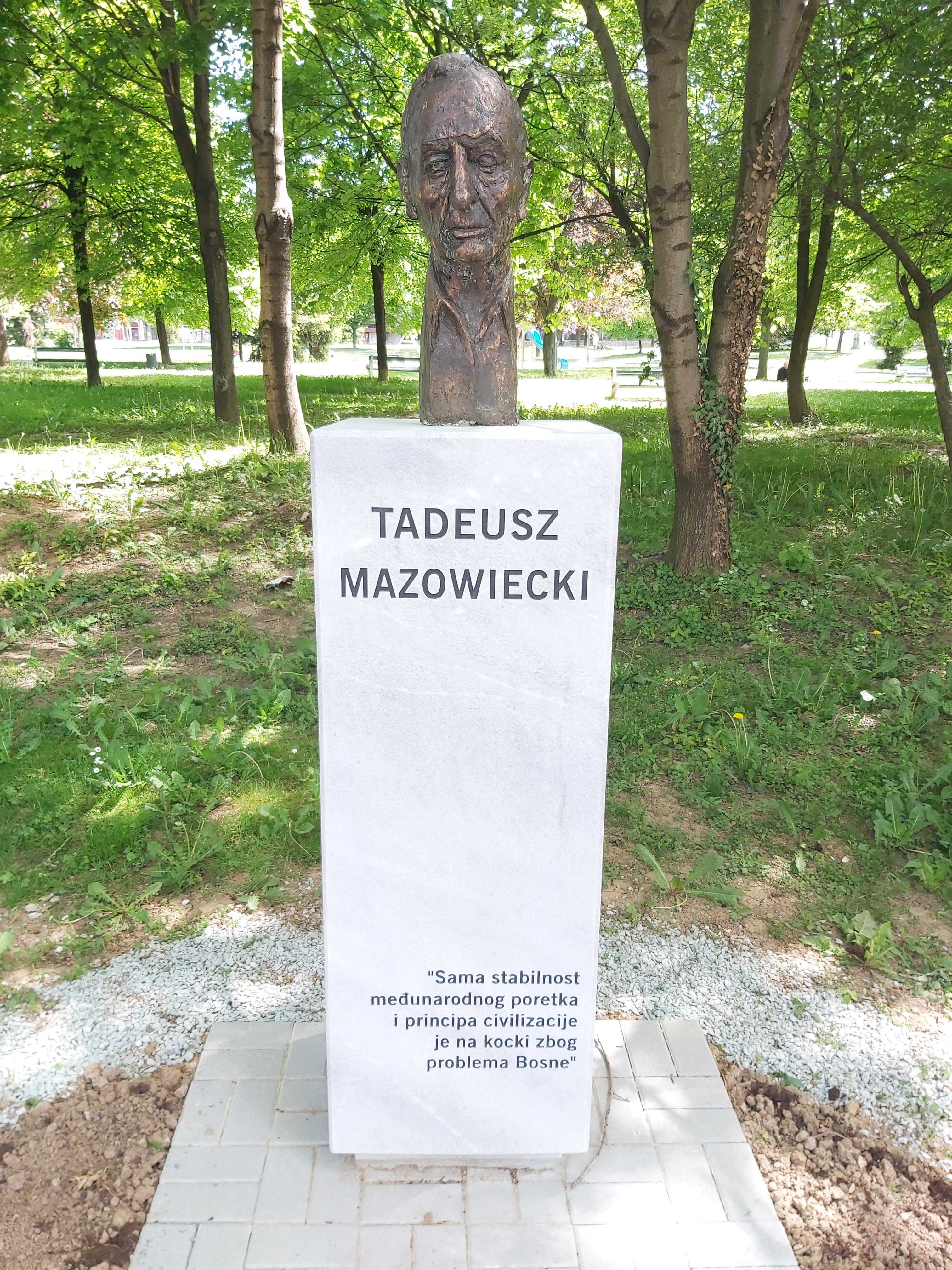 Bista Tadeusza Mazowieckog u Sarajevu